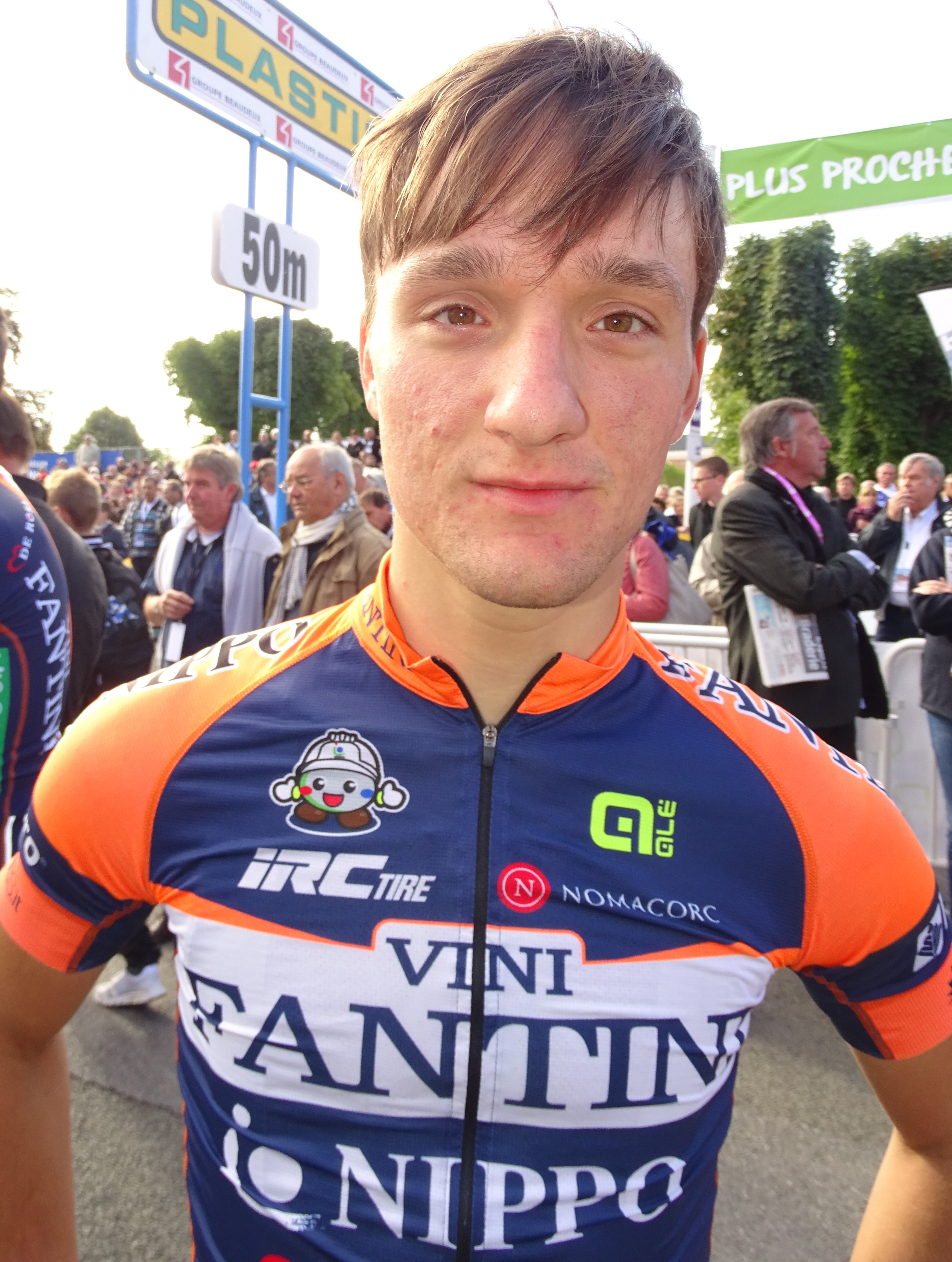 Reportage réalisé le dimanche 6 septembre à l'occasion du départ et de l'arrivée du Grand Prix de Fourmies 2015 à Fourmies, Nord-Pas-de-Calais, France.